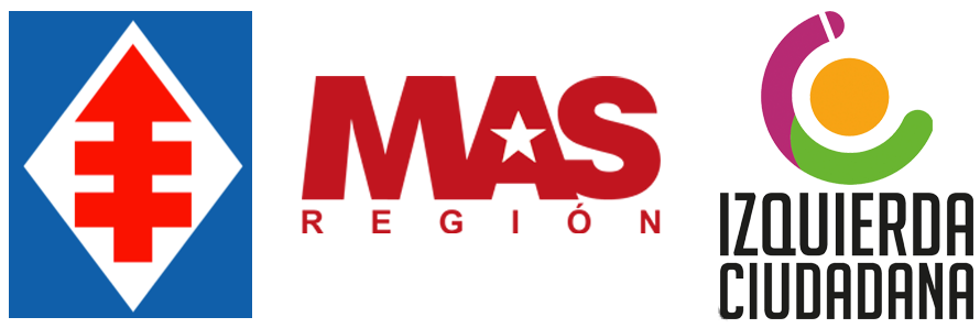 Logo convergencia democrática.